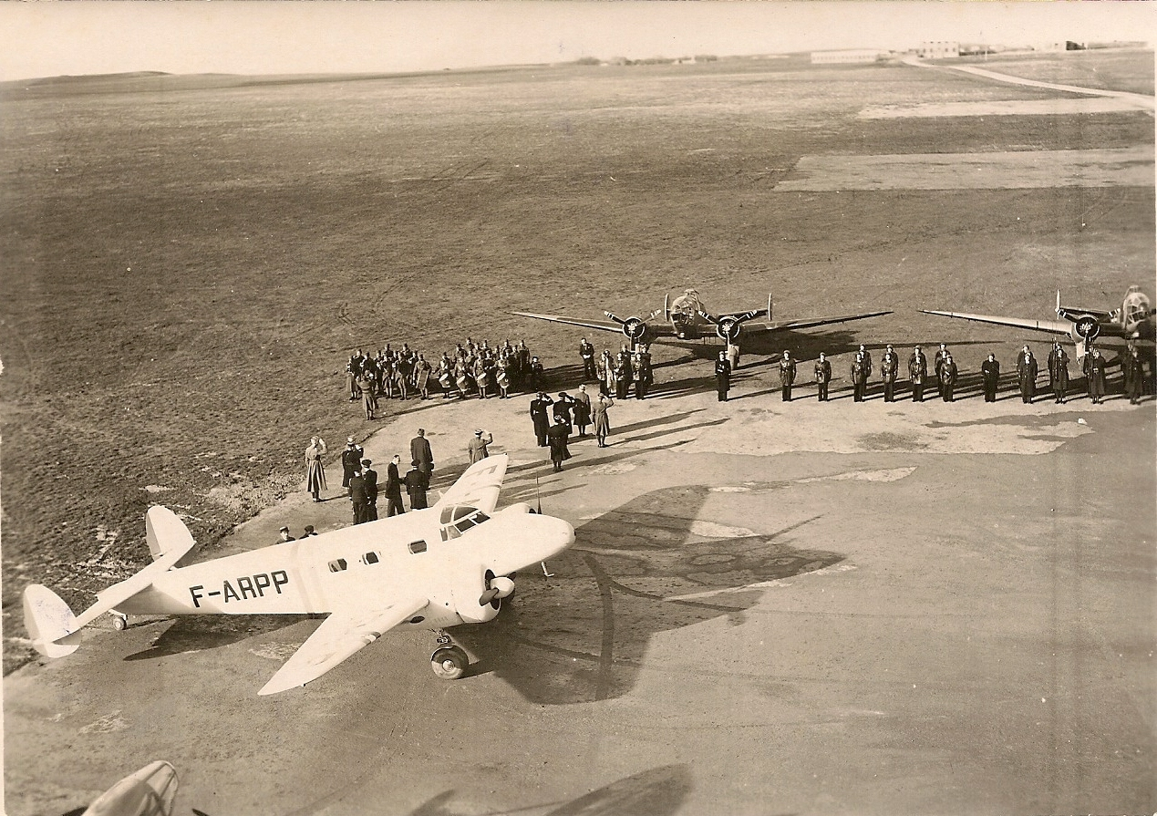 Il s'agit de l'avion ayant amené le général Maxime Weygand, Délégué général en Afrique française